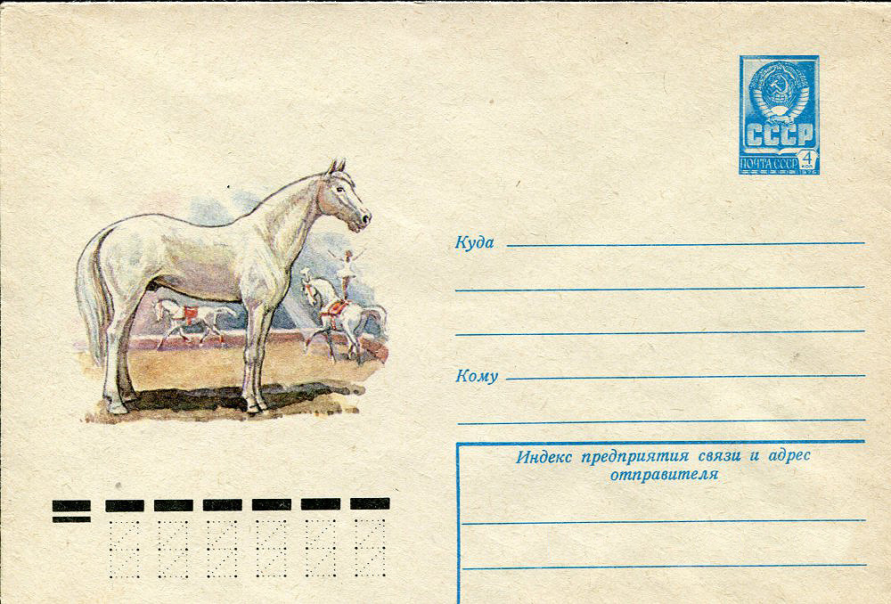 ХМК "Лошадь терской породы"